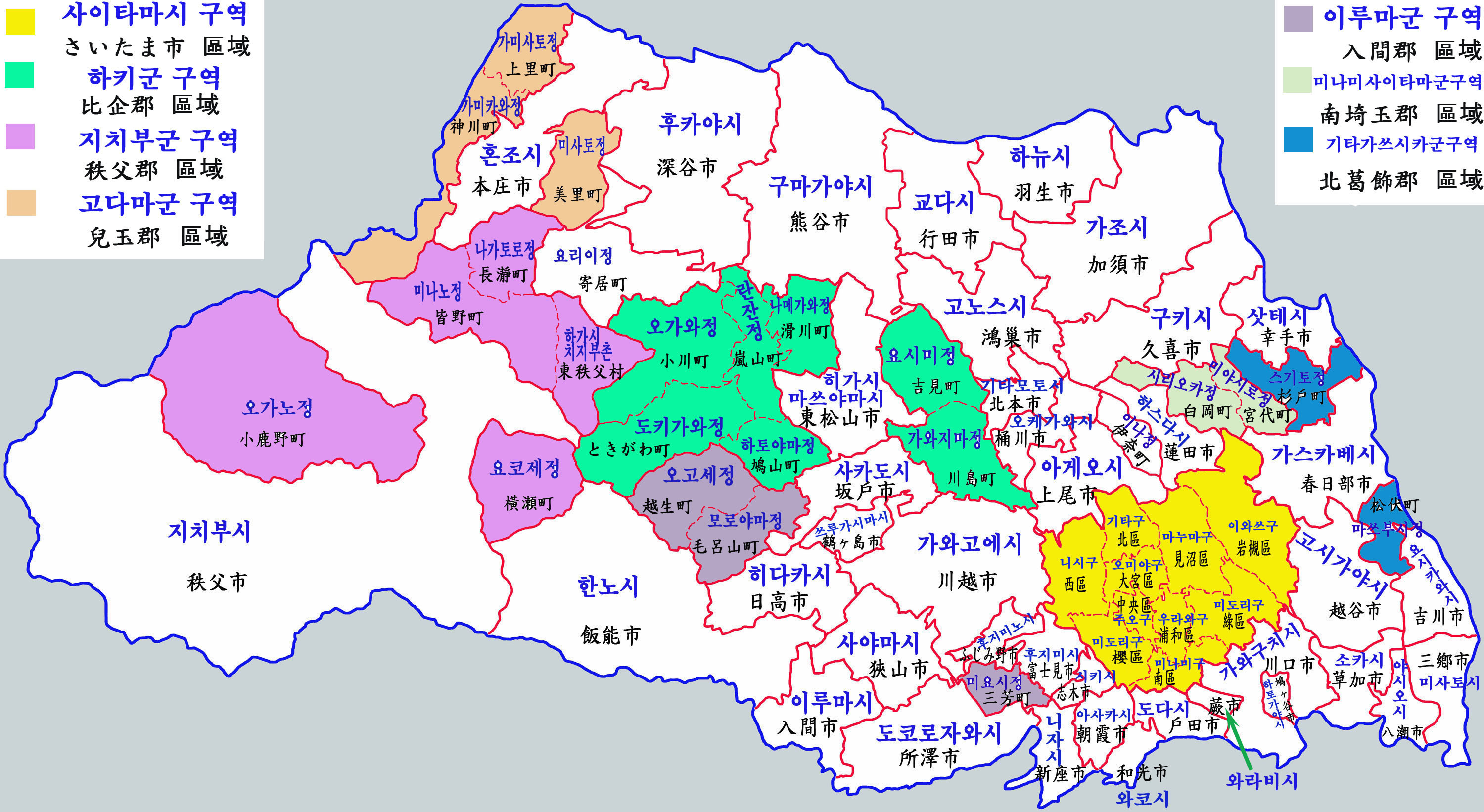 사이타마현 행정구역